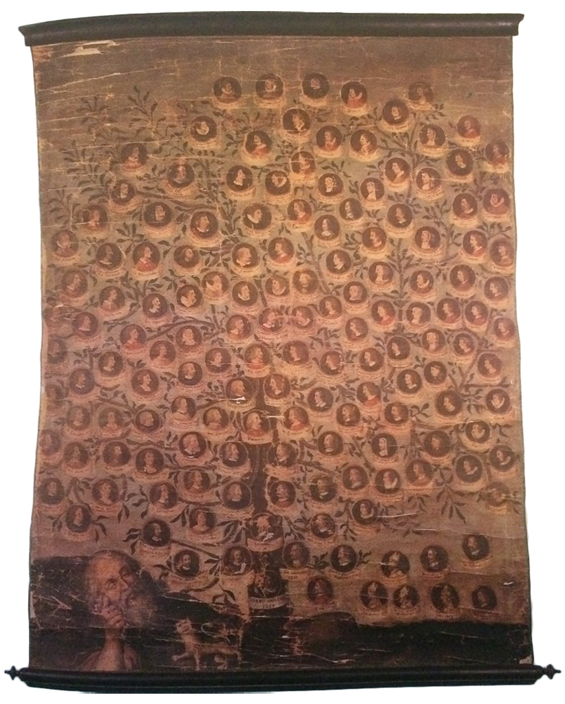 Dipinto olio su tela di anonimo, conservato presso l'Archivio di Stato di Alessandria, raffigurante l'albero genealogico della famiglia Ghilini dal secolo XII ai primi anni del secolo XVIII